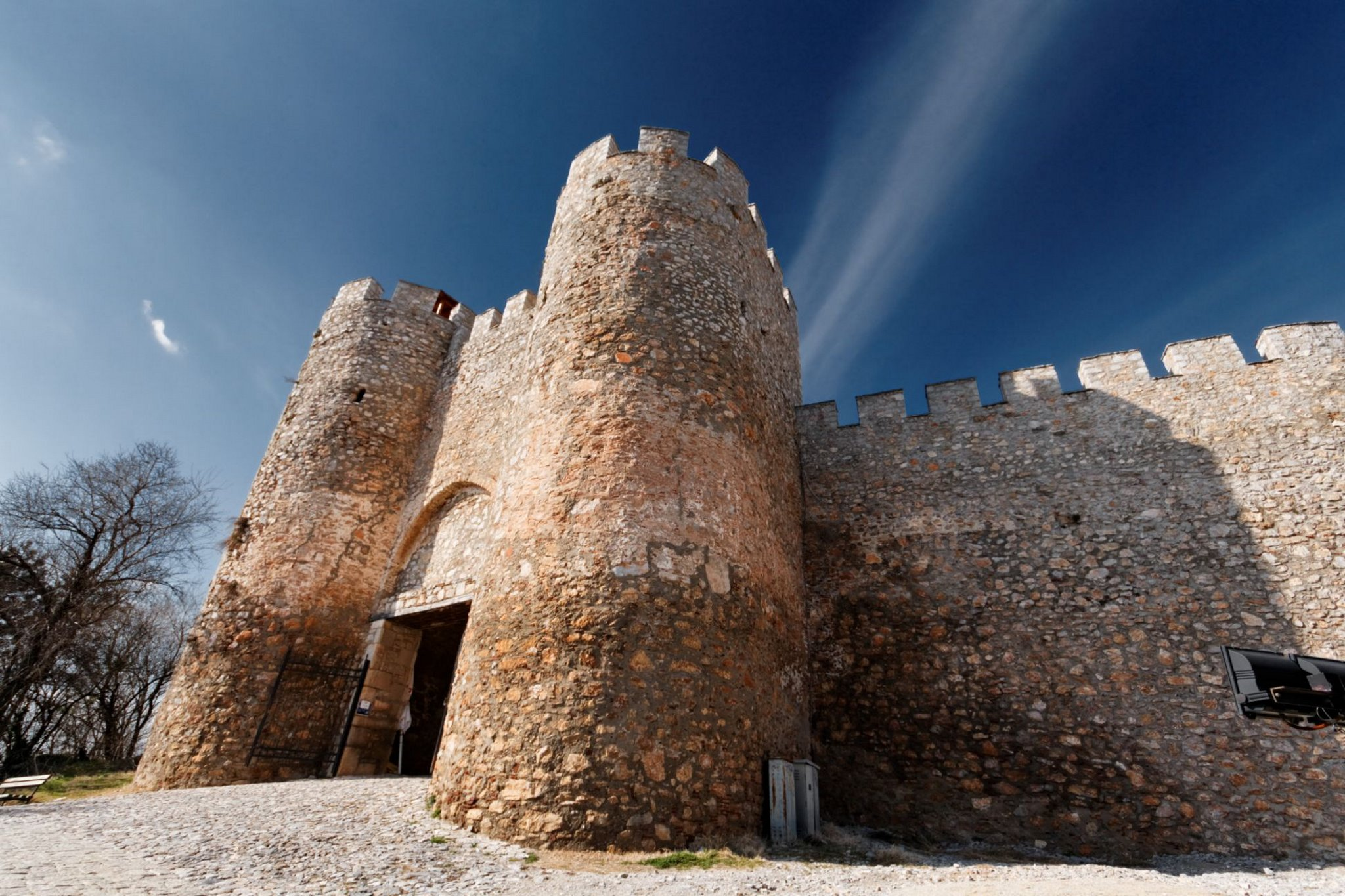 Samuilova tvrdina -- Ohrid